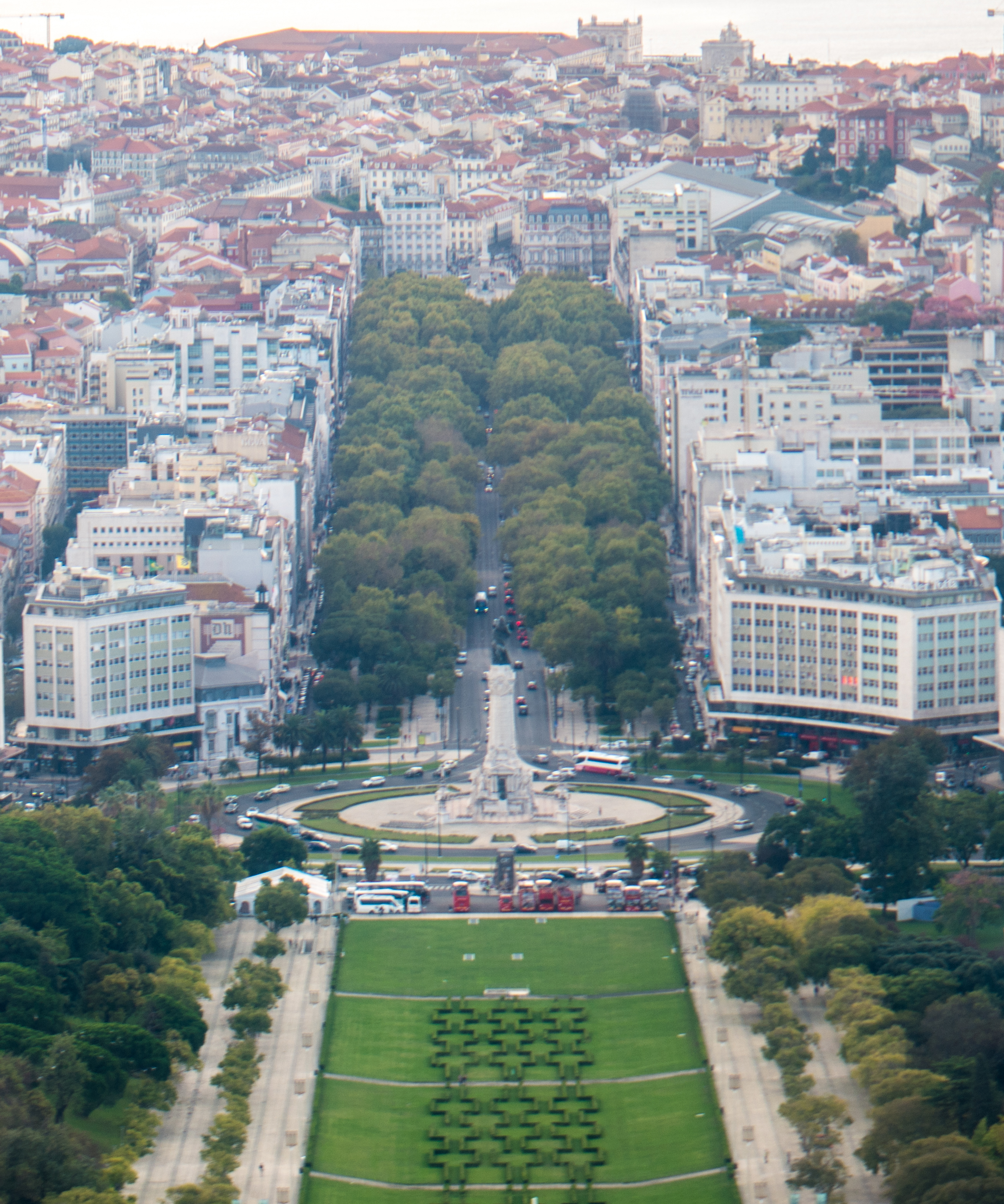 Avenida da Liberdade